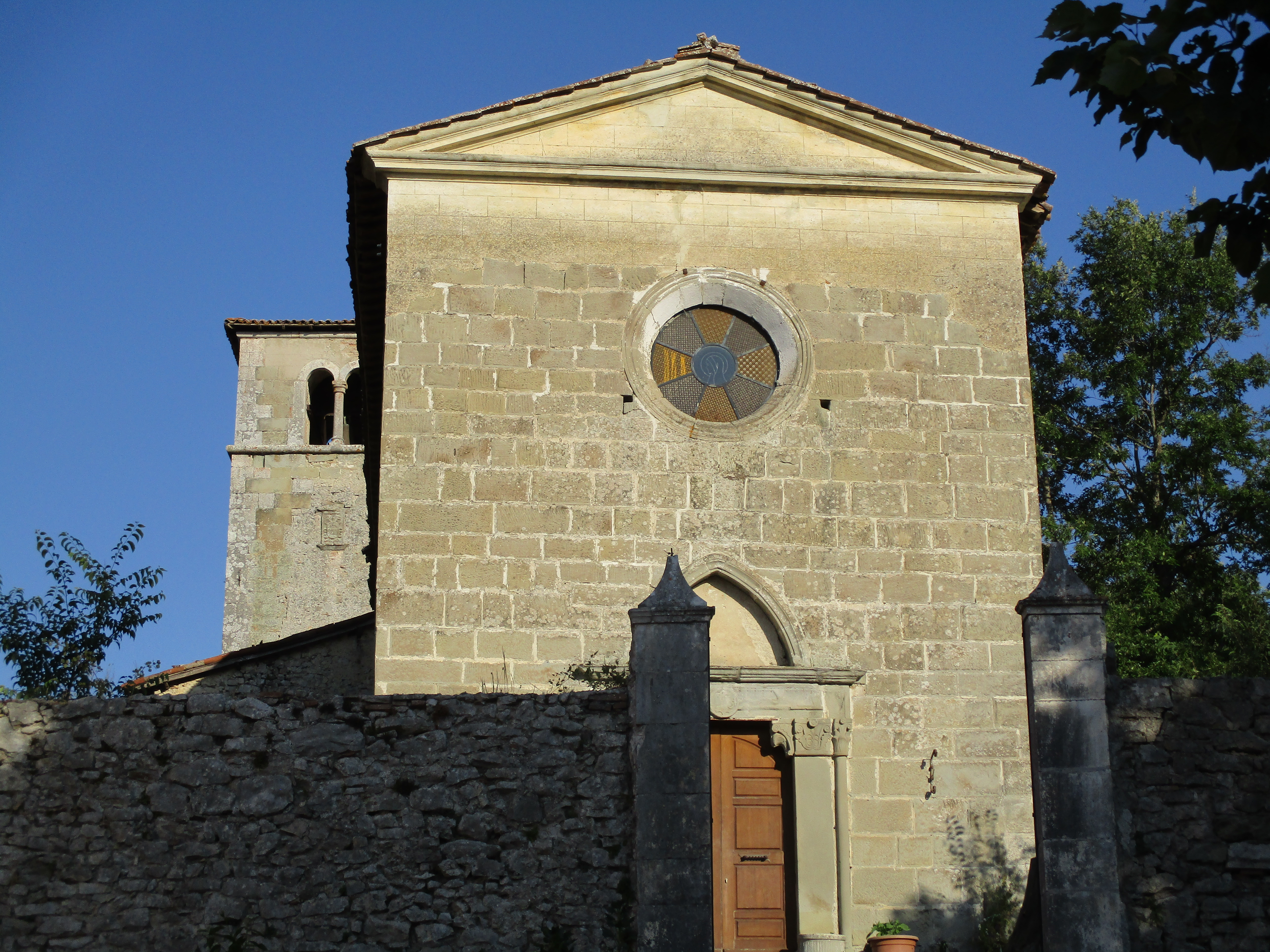 Chiesa di Santa Maria delle Grazie a Tufo Basso